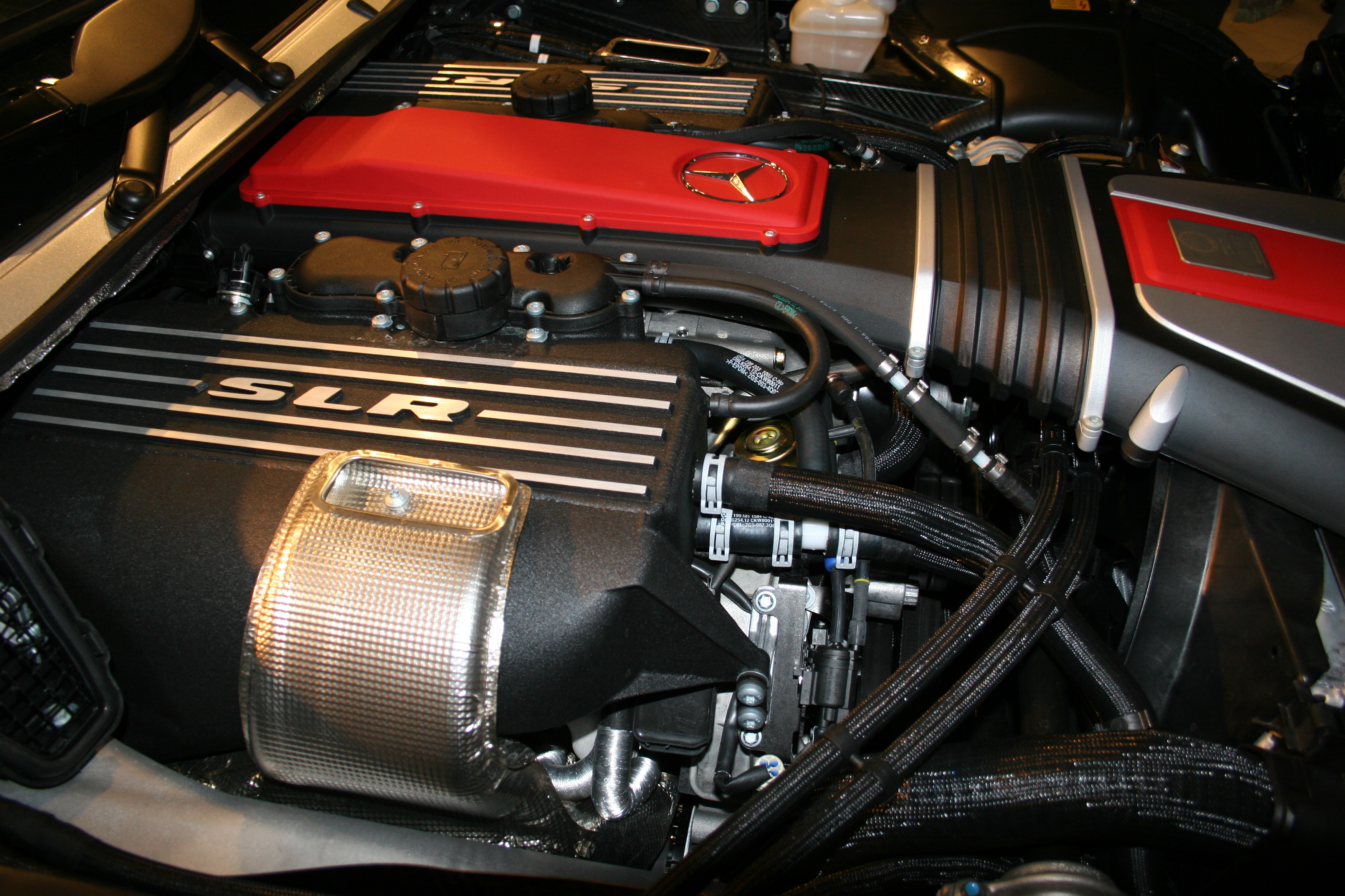 Mercedes-Benz SLR McLaren (Norway 2005)